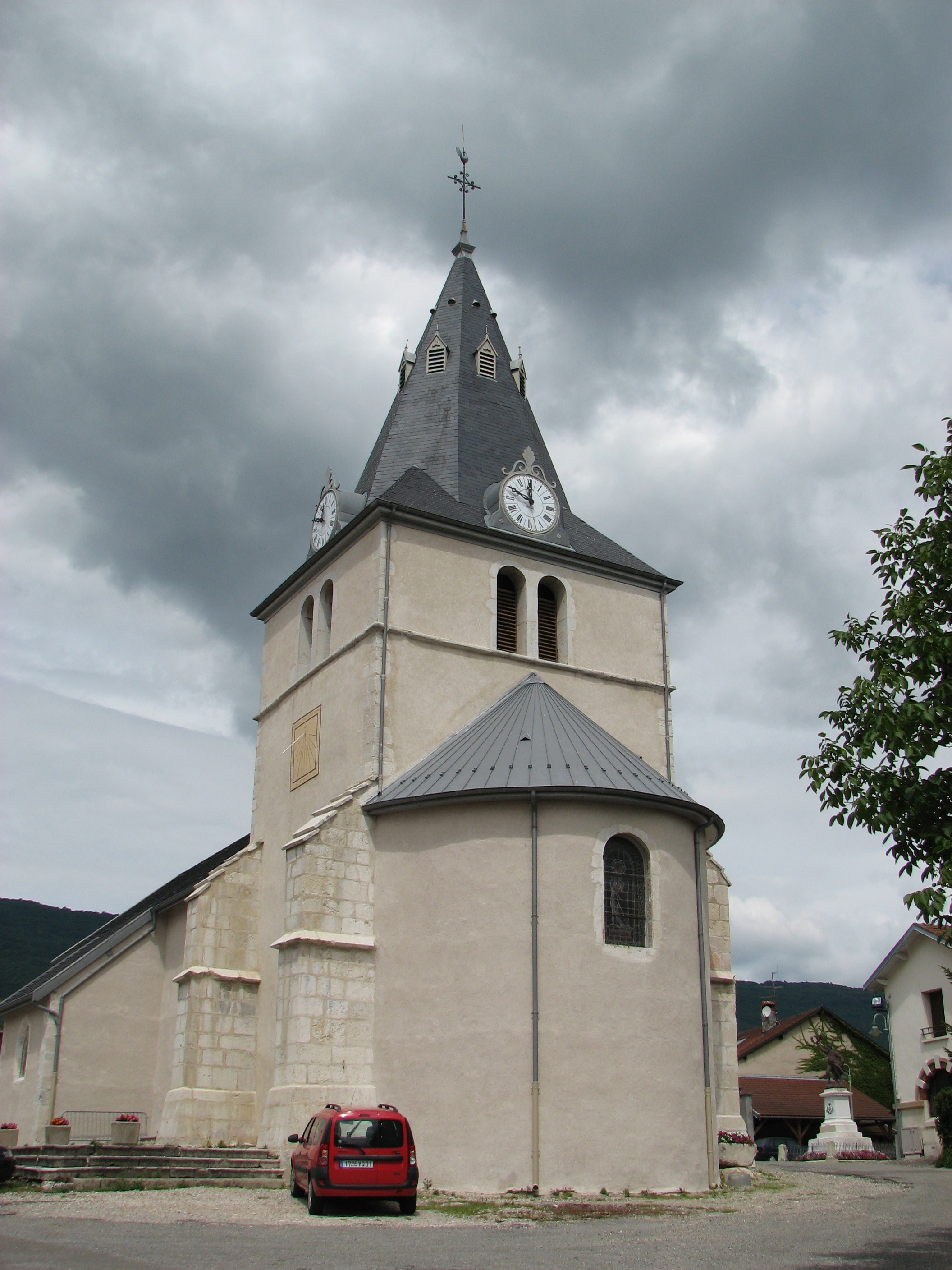 Église de Billiat (Ain)